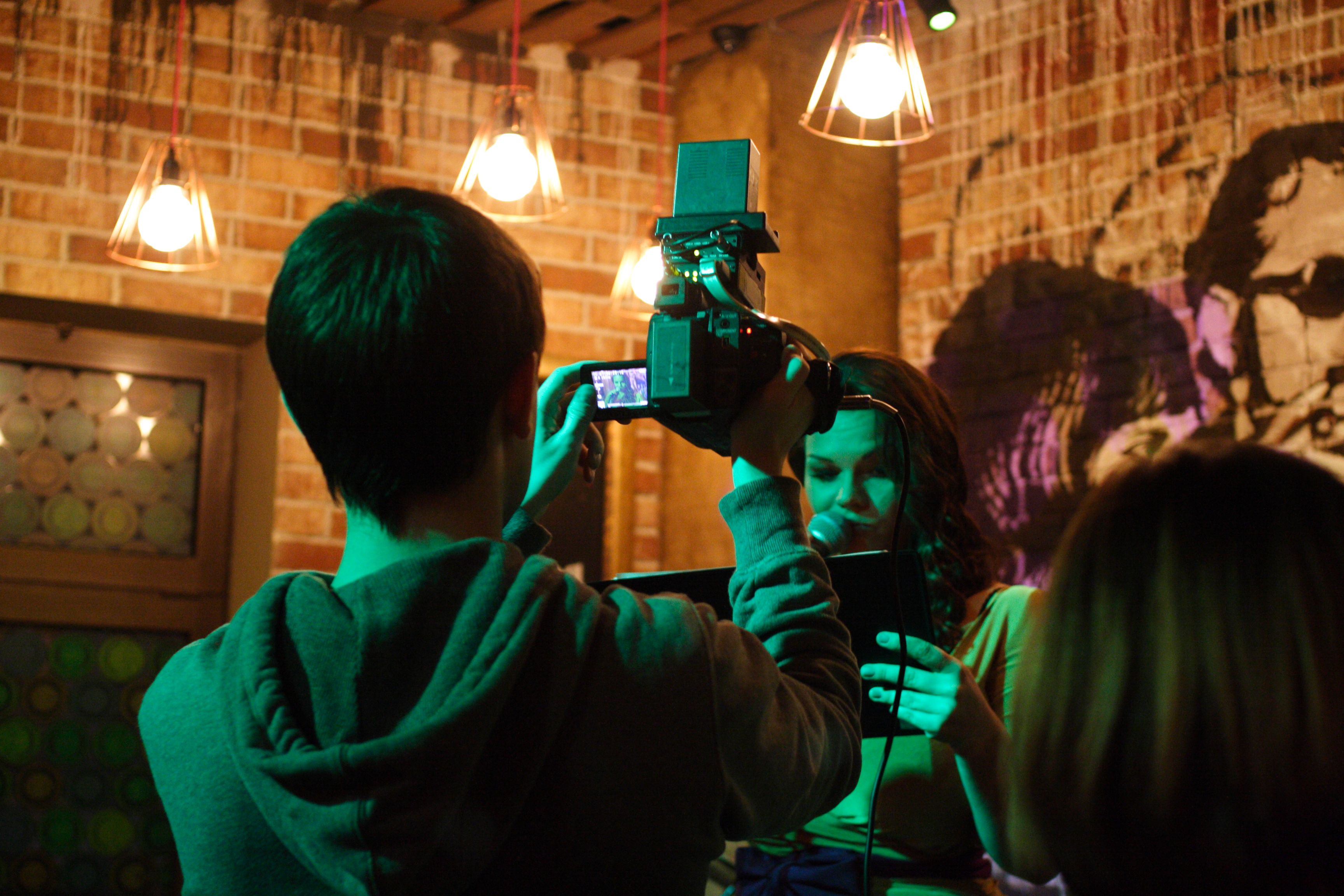 Ridus correspondent at Antipremia Runeta 2012.